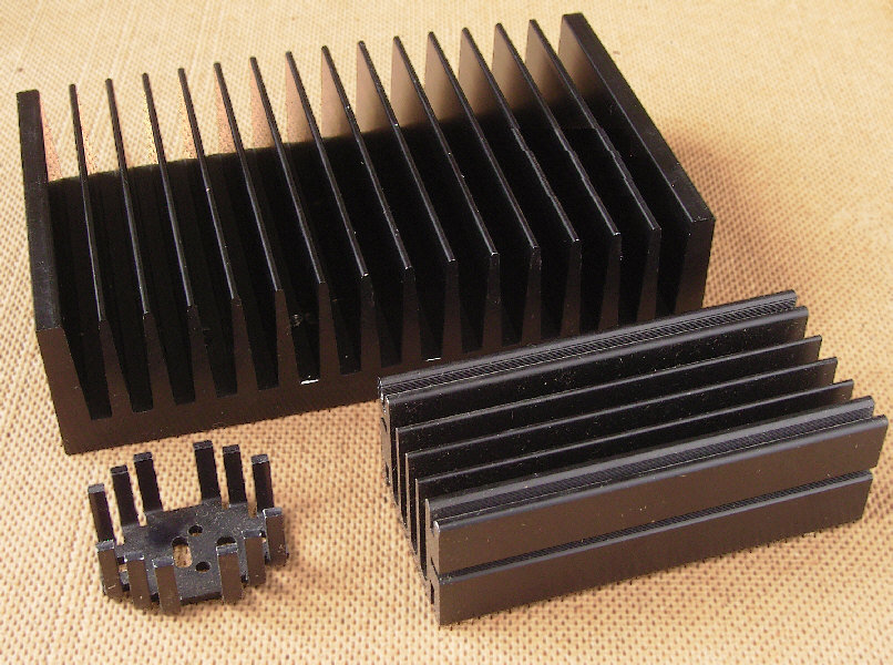 Verschiedene schwarz eloxierte Aluminium-Kühlkörper